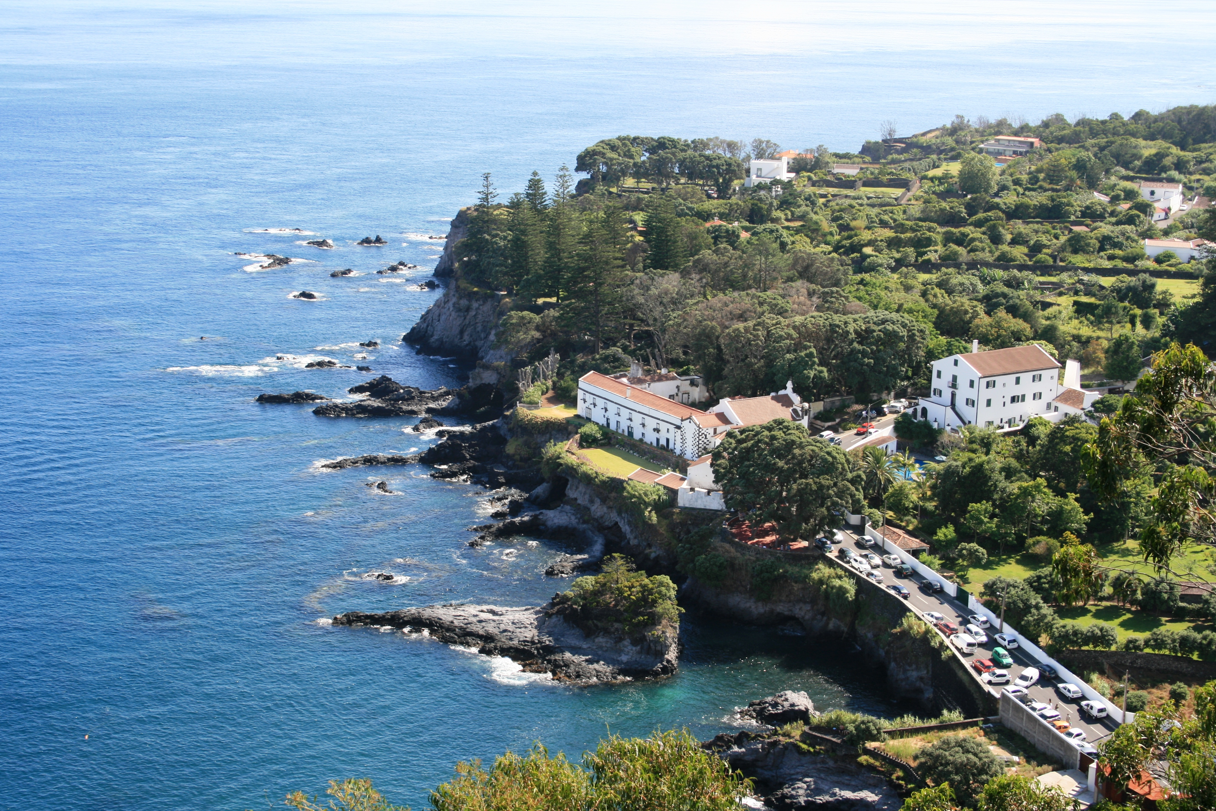 Sao Miguel Azores